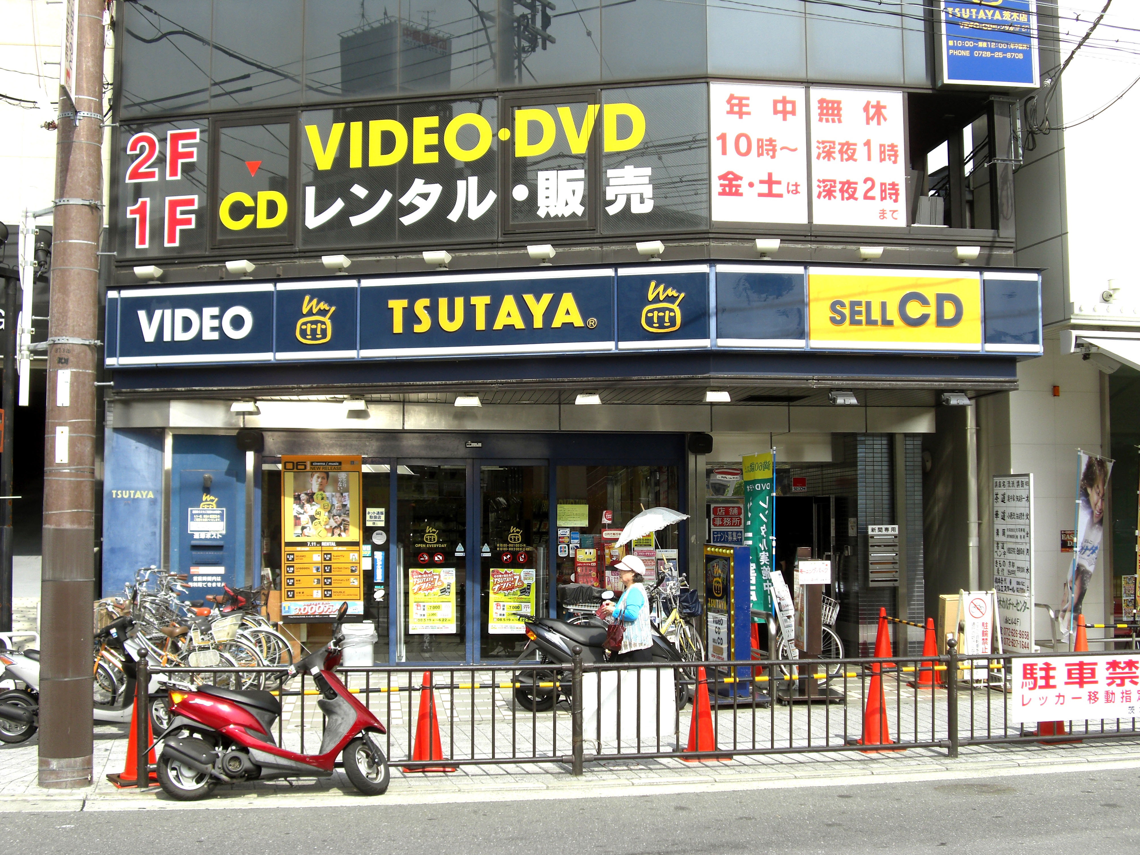 TSUTAYA Ibaraki Ekimae, Ibaraki-City, Osaka, Japan.